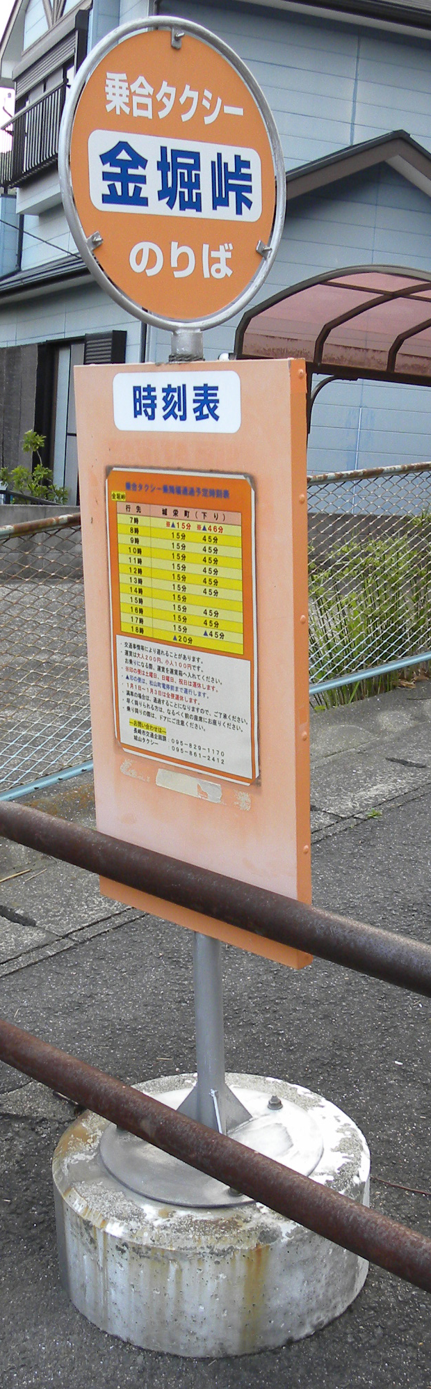 長崎市乗合タクシー 金堀地区の停留所